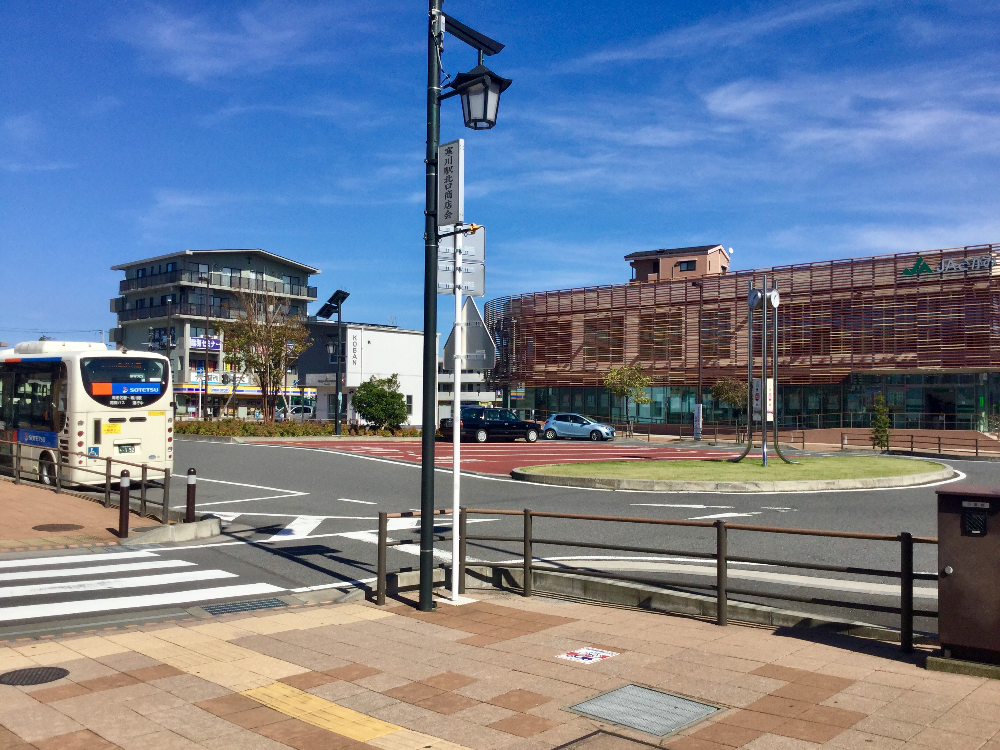 寒川駅北口駅前広場